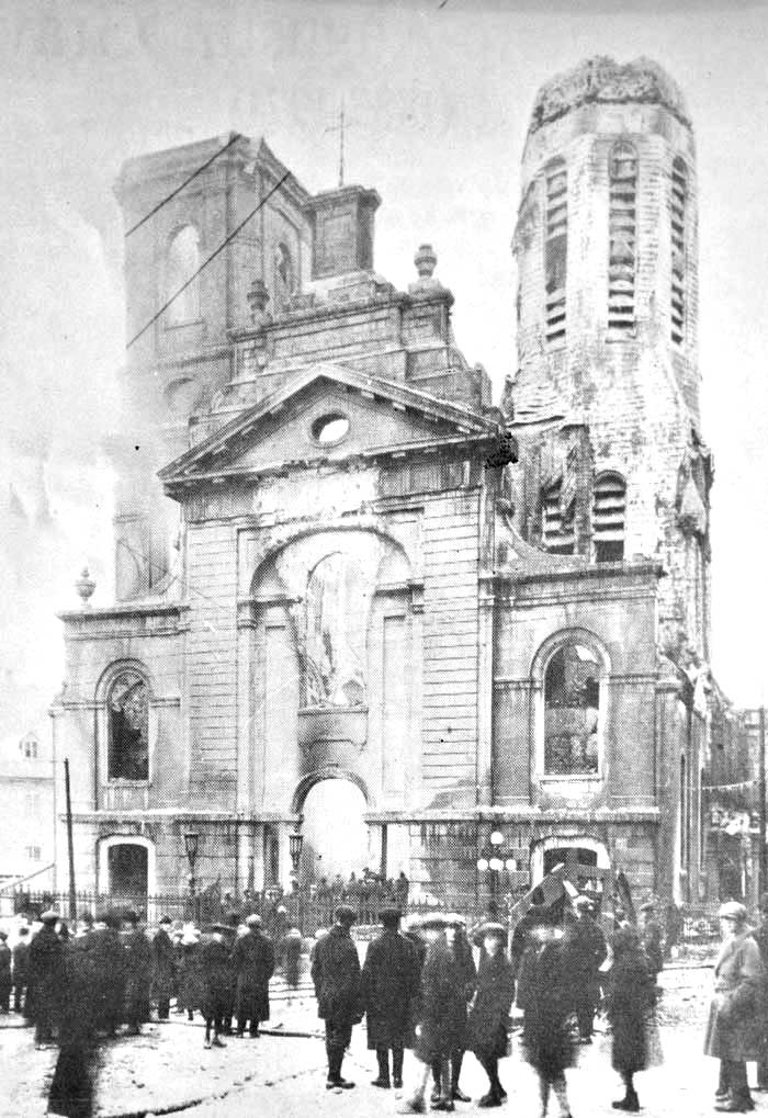 La basilique-cathédrale Notre-Dame de Québec, peu après l’incendie majeur du 22 décembre 1922.